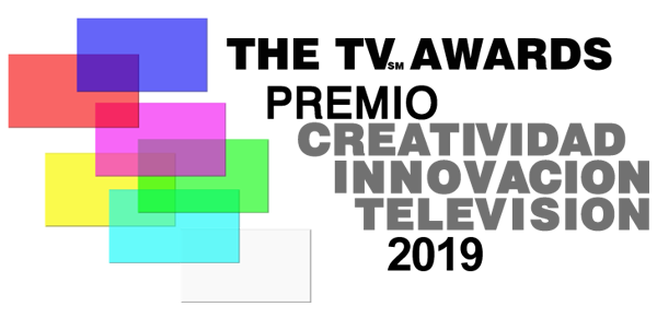 Premio Creatividad Innovación Televisión